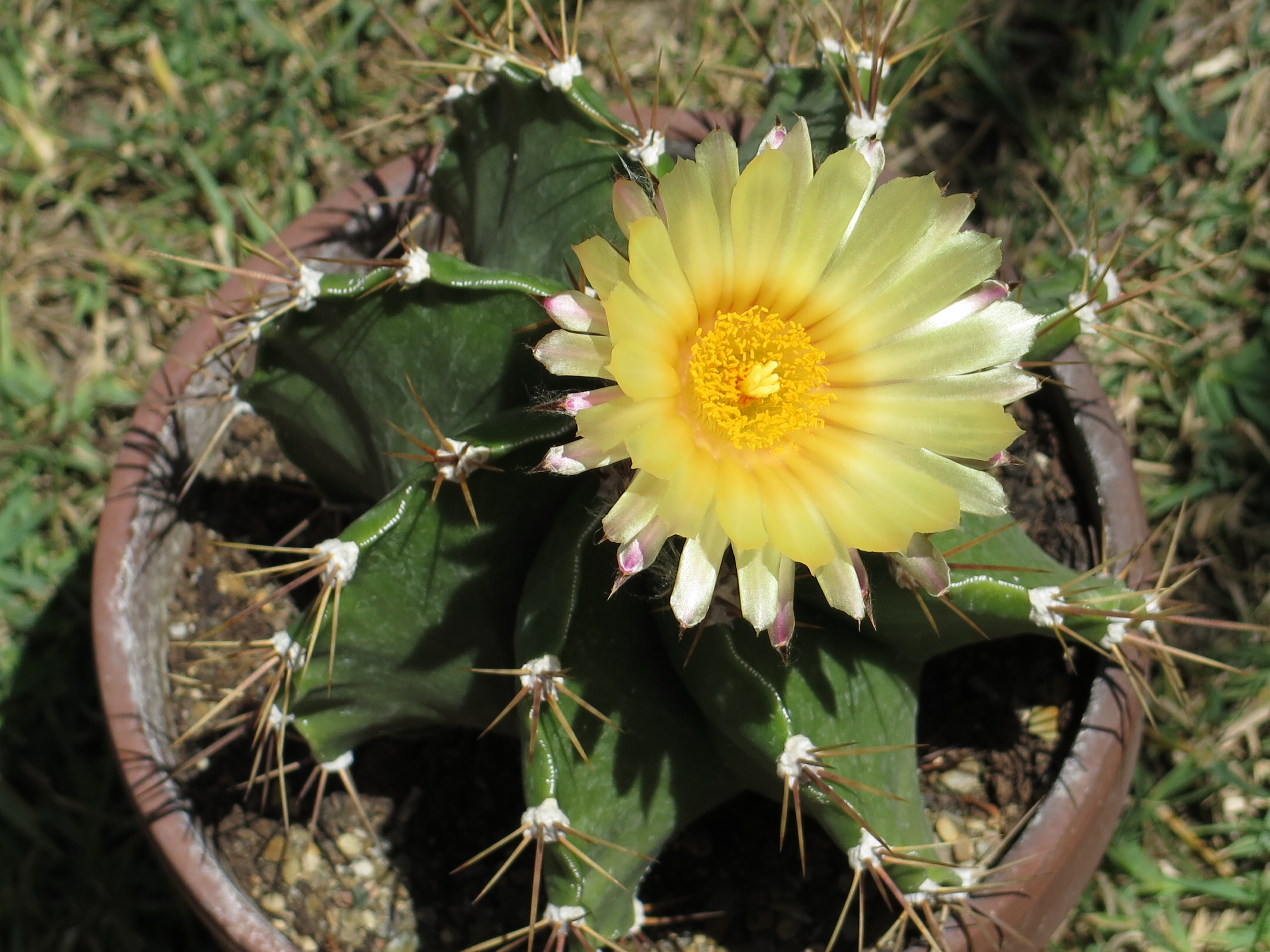 Un astrophytum ornatum in fiore